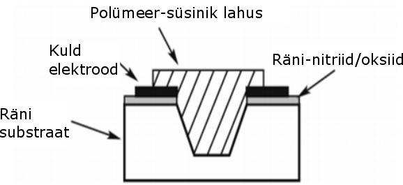 polymersensor